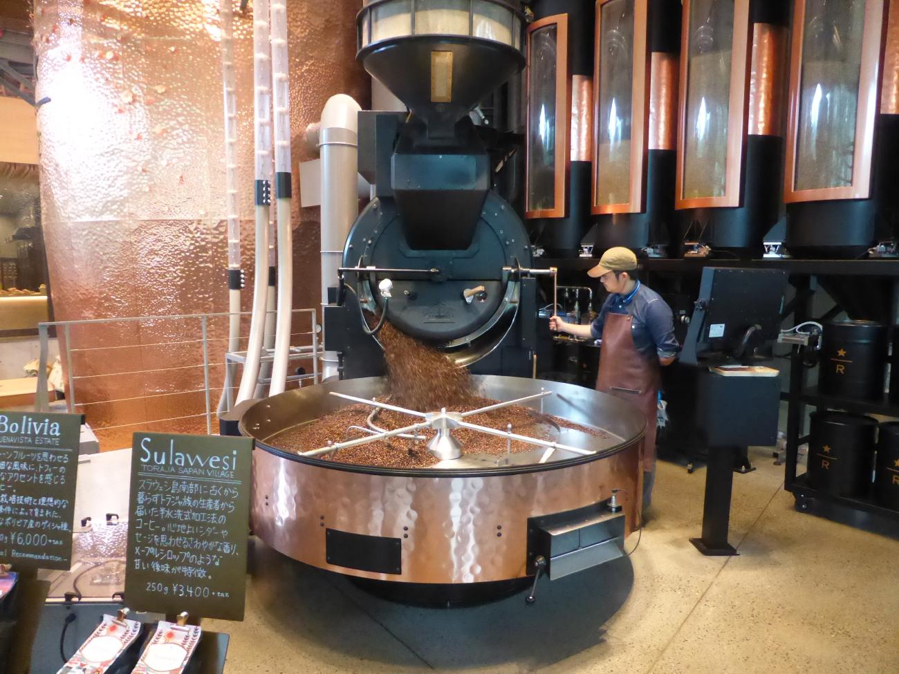 焙煎が終わったコーヒー豆を冷やす